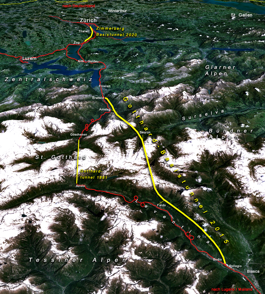 Situation Nord der Gotthardachse der Neuen Eisenbahn-Alpentransversale NEAT in der Schweiz